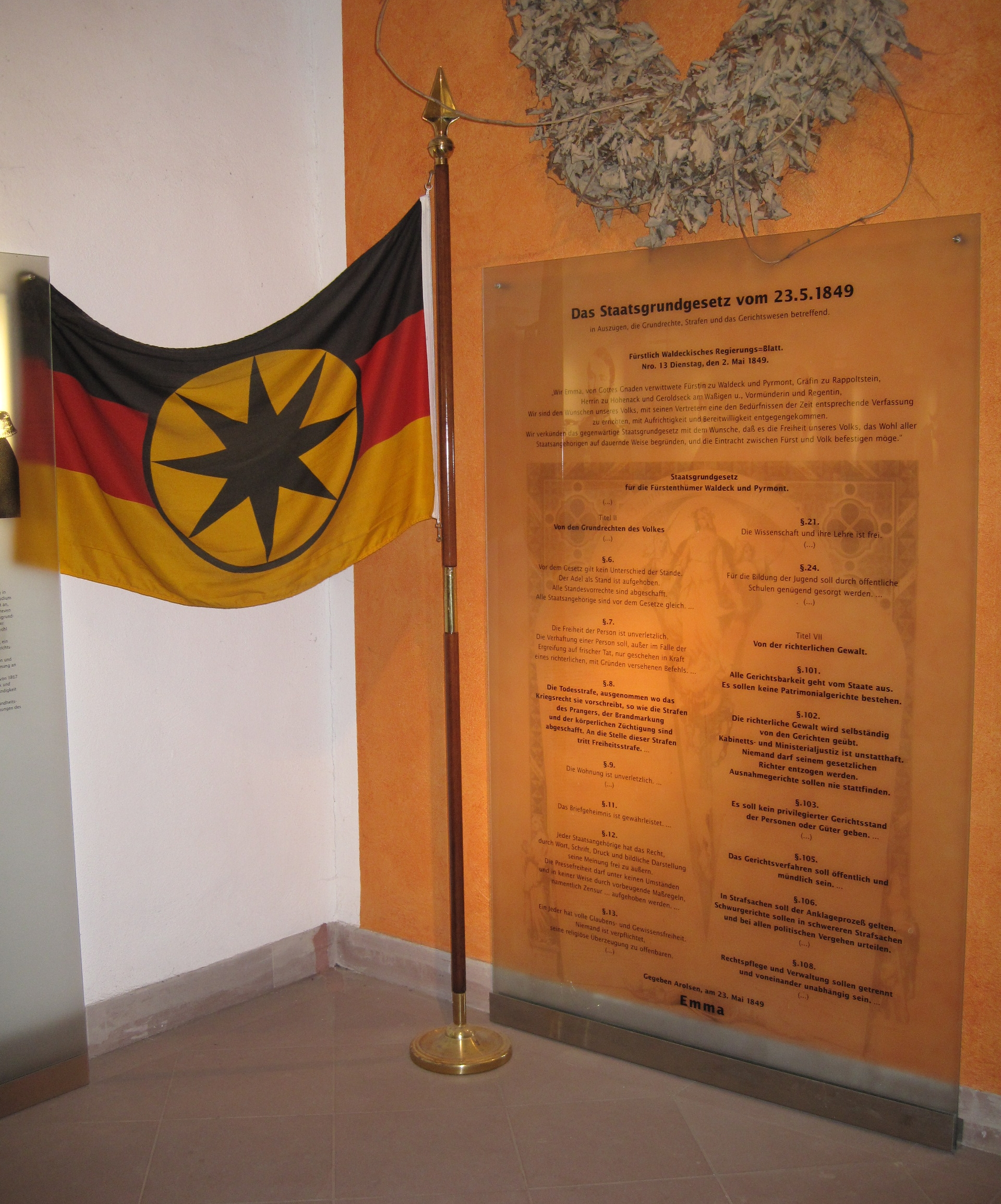 Tafel mit Auszügen aus dem Staatsgrundgesetz für die Fürstentümer Waldeck und Pyrmont vom 23. Mai 1849 im Schlossmuseum Waldeck (Edersee).